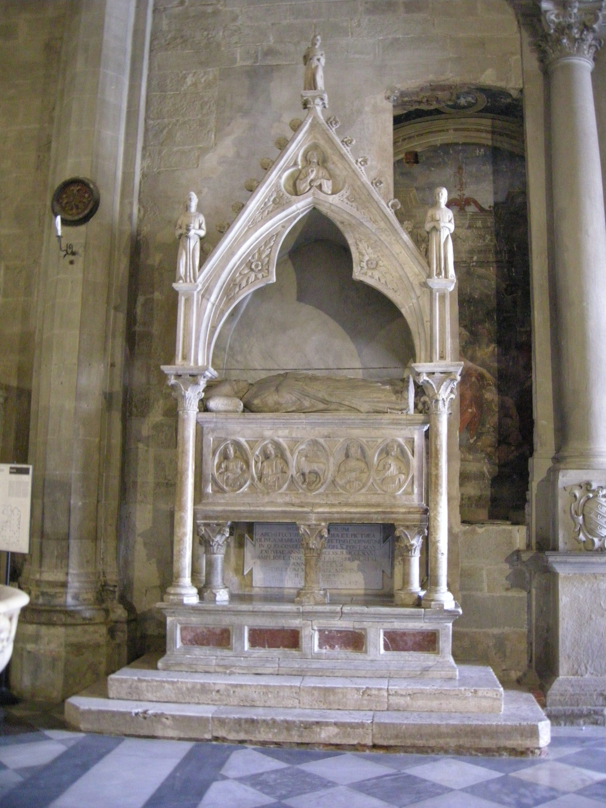 Duomo di arezzo, interno, sepolcro di gregorio X, inizi XIV secolo